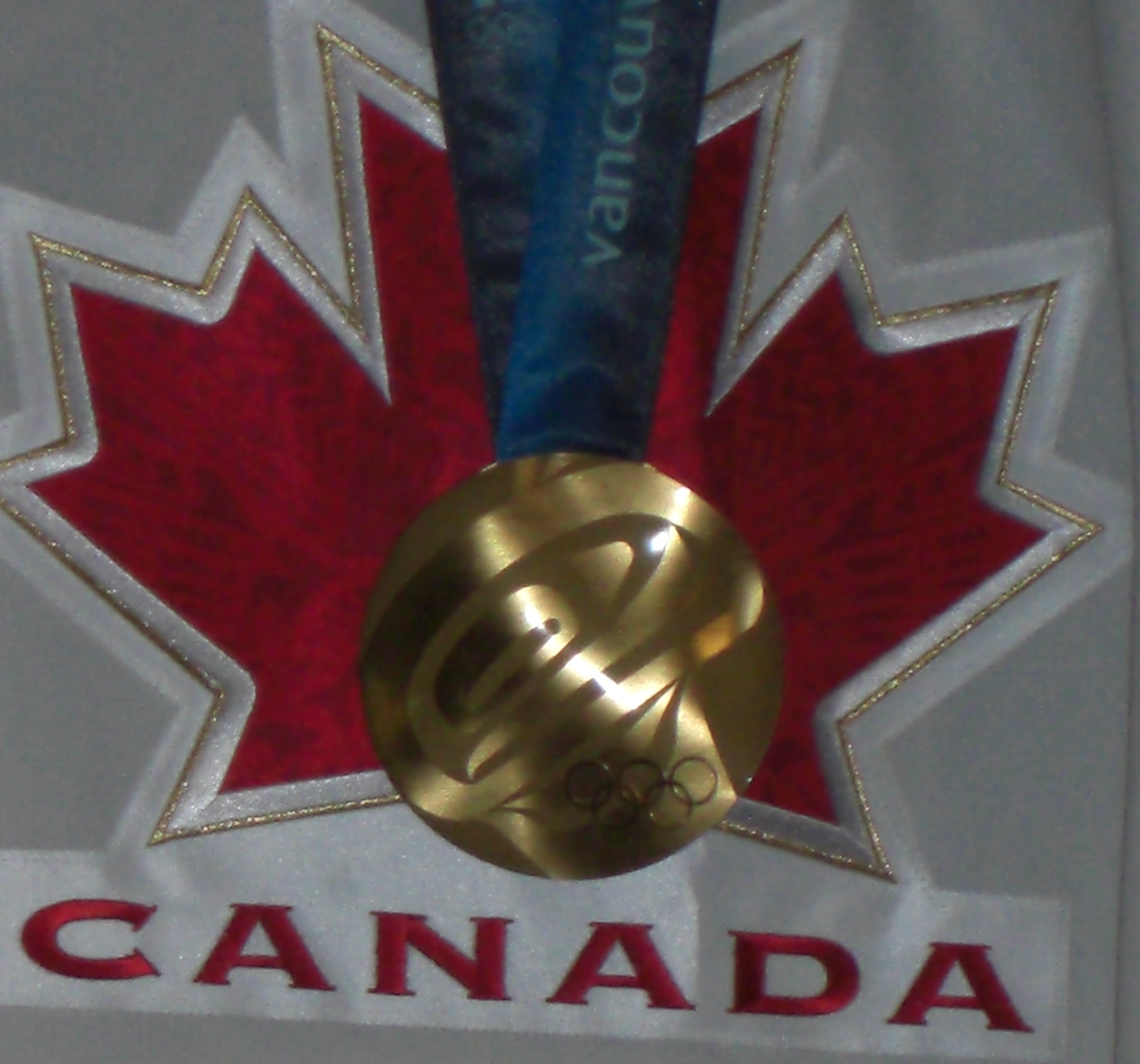 Eric Staal's gold